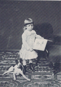 Rainer Maria Rilke (1875-1926) a tre anni